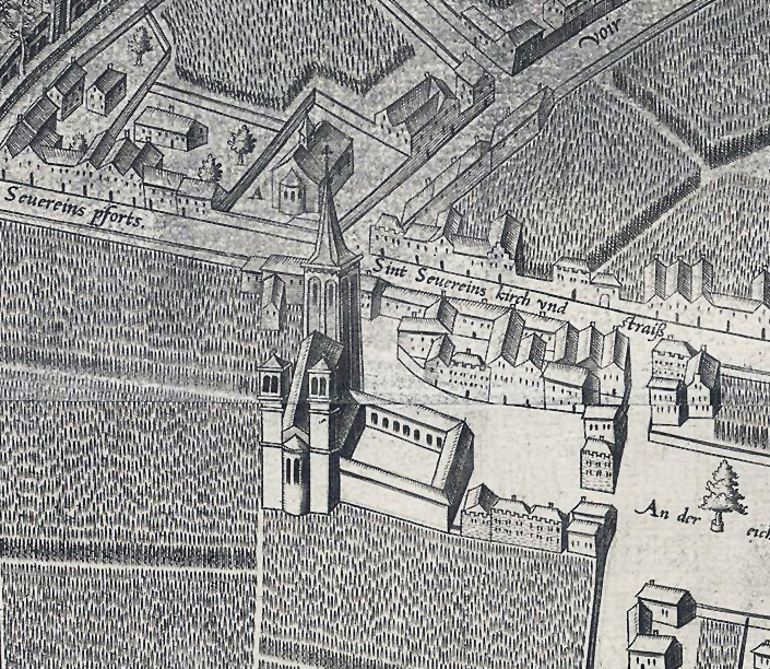 Ausschnitt des Mercator - Stadtplanes, Bereich St. Severin / St. Maria Magdalena